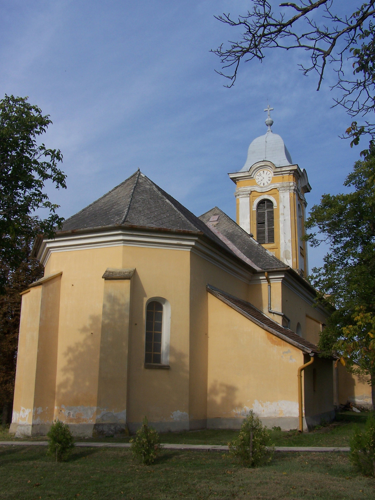 Evangélikus templom (Aszód, Szontágh lépcső) This is a photo of a monument in Hungary. Identifier: 6893